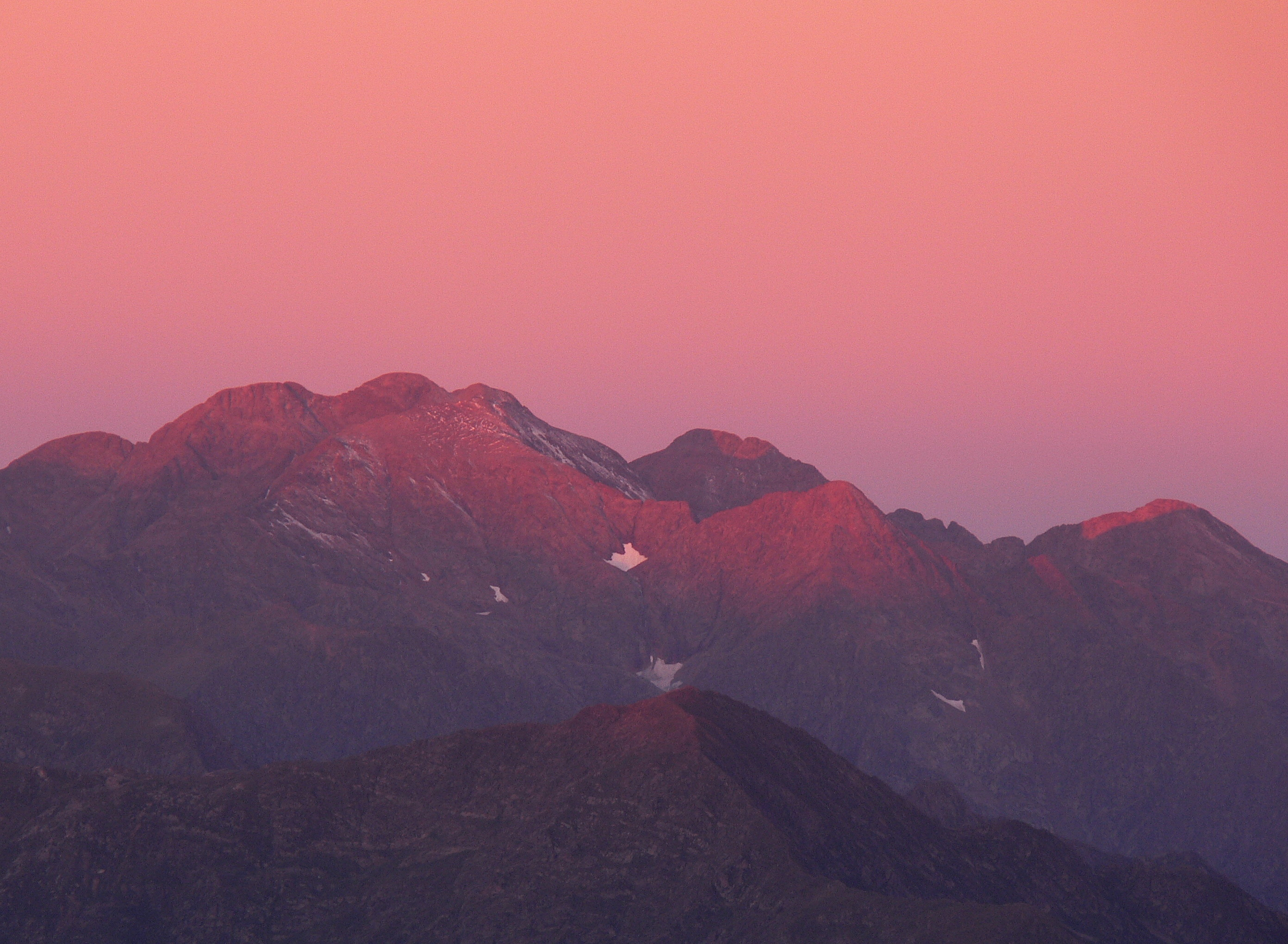 Massif du Montcalm depuis le pic de Saint-Barthélemy, au lever du soleil. A gauche du centre les trois sommets principaux, comprenant de gauche à droite: la Punta Gabarro, la Pique d'Estats, et la pointe Verdaguer. Plus à droite, le pic du Port de Sullo, et à l'extrême droite, le Guins de l'Ase. Le pic du Montcalm est en avant-plan, juste dans l'axe de la Pique d'Estats. Au premier plan vers le centre, la Pique d'Endron.